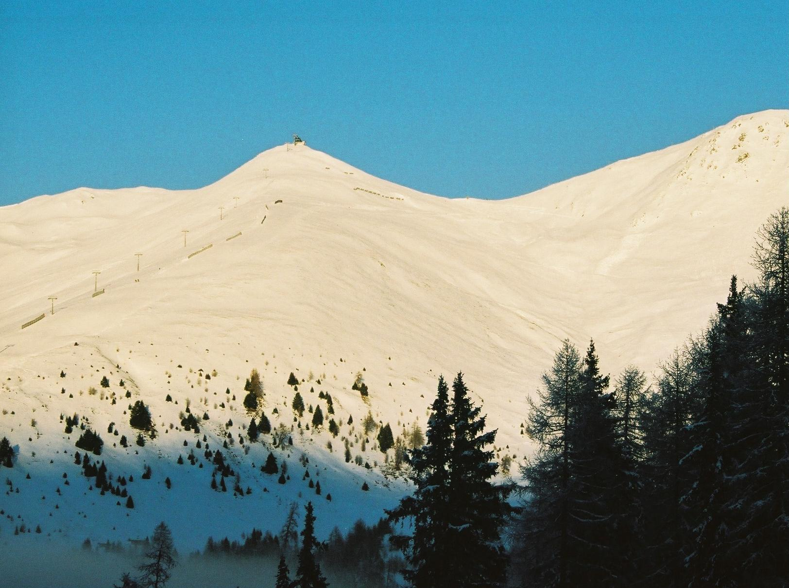 Tscheyegg 2666 m in Nauders am Dreiländereck Österreich Schweiz Italien